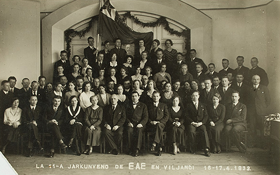 La 11-a jarkunveno de Esperanto-Asocio de Estonio en Viljandi, 16-17.04.1933